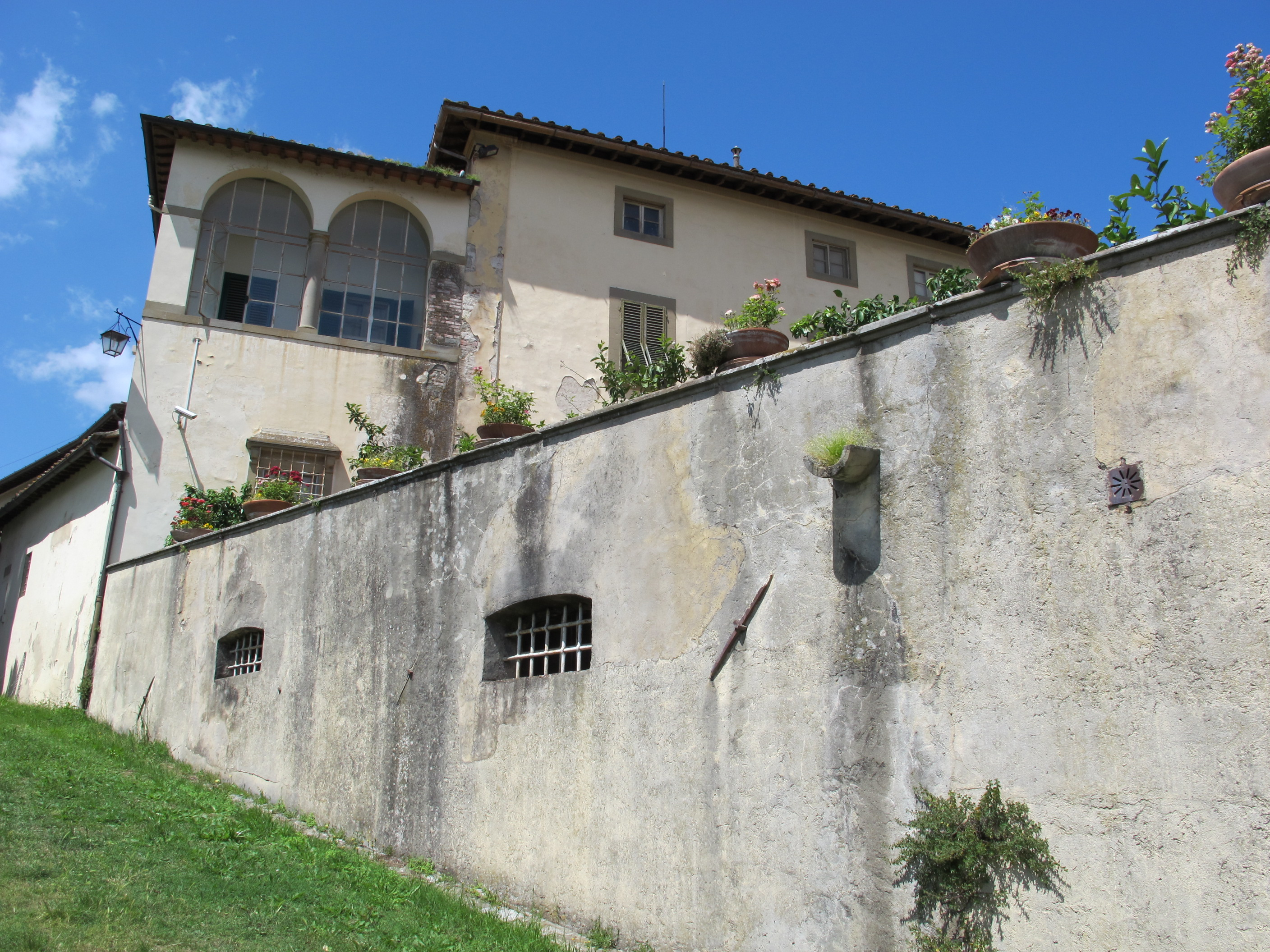 Fattoria di capezzana